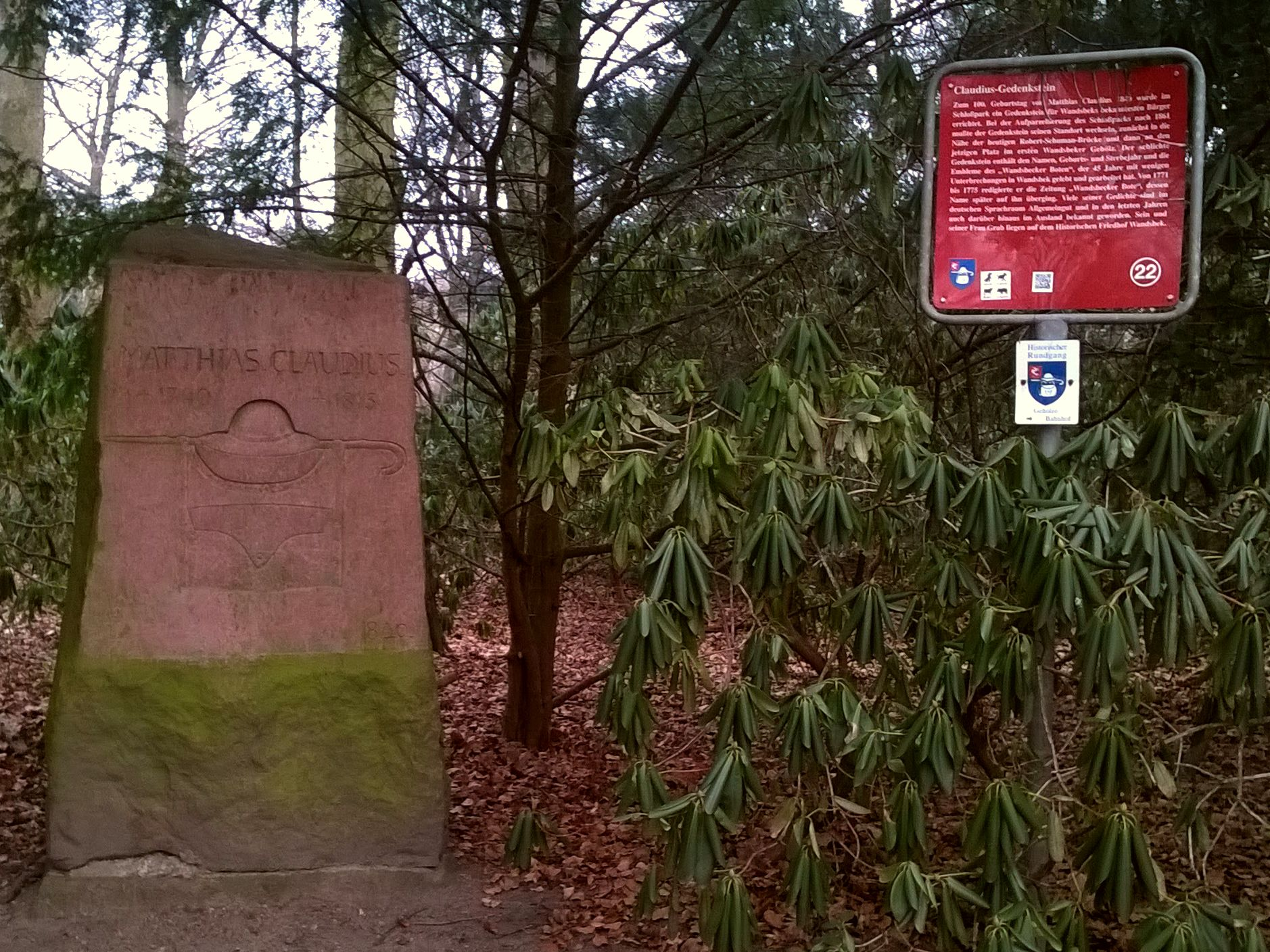 Gedenkstein für Matthias Claudius von 1840, ursprünglich im Wandsbeker Schlosspark, jetzt im Ersten Wandsbeker Gehölz